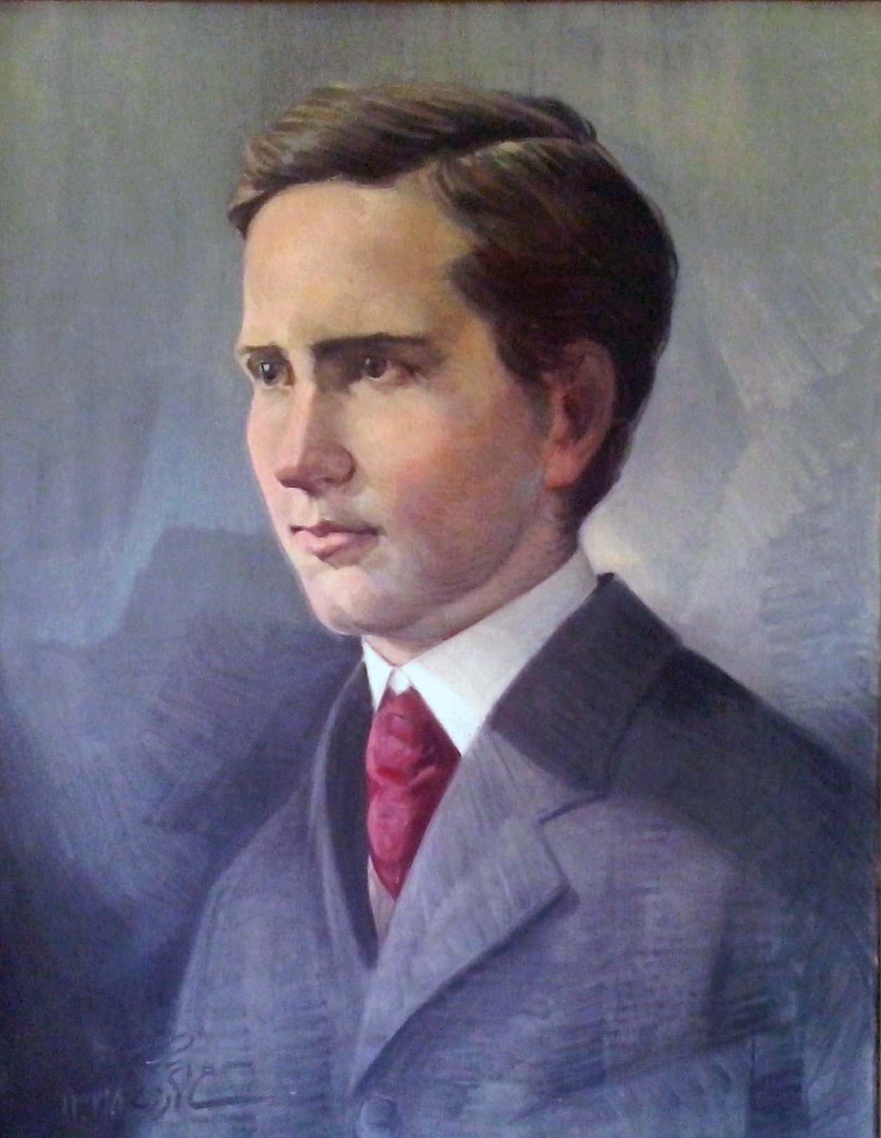 تابلوی نقاشی هوارد باسکرویل در موزه مشروطه تبریز. ۱۳۳۵.